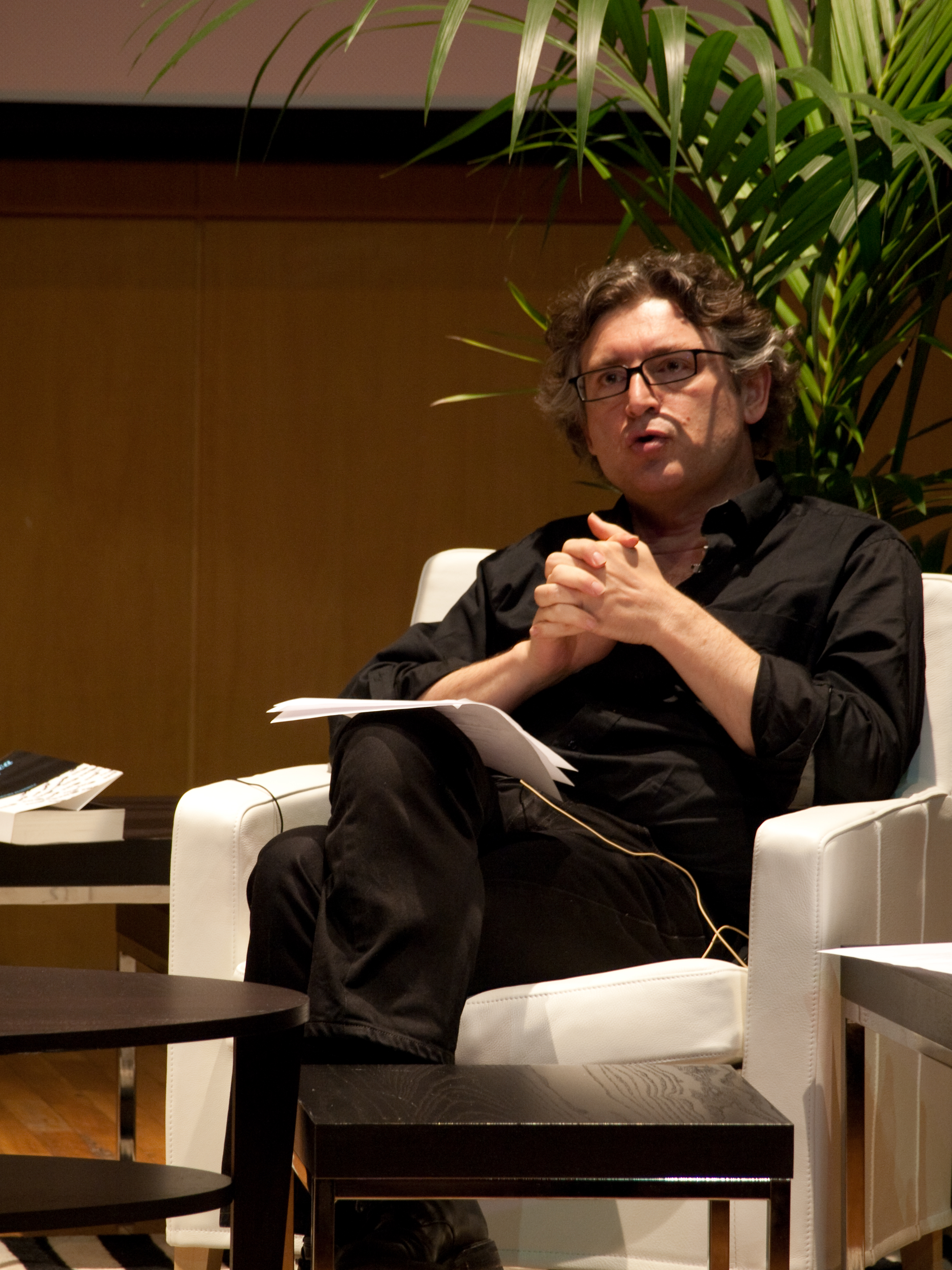 Debate realizado en el espacio de Voces Mapfre, dedicado a la reflexión y a la filosofía, con Michel Onfray como invitado